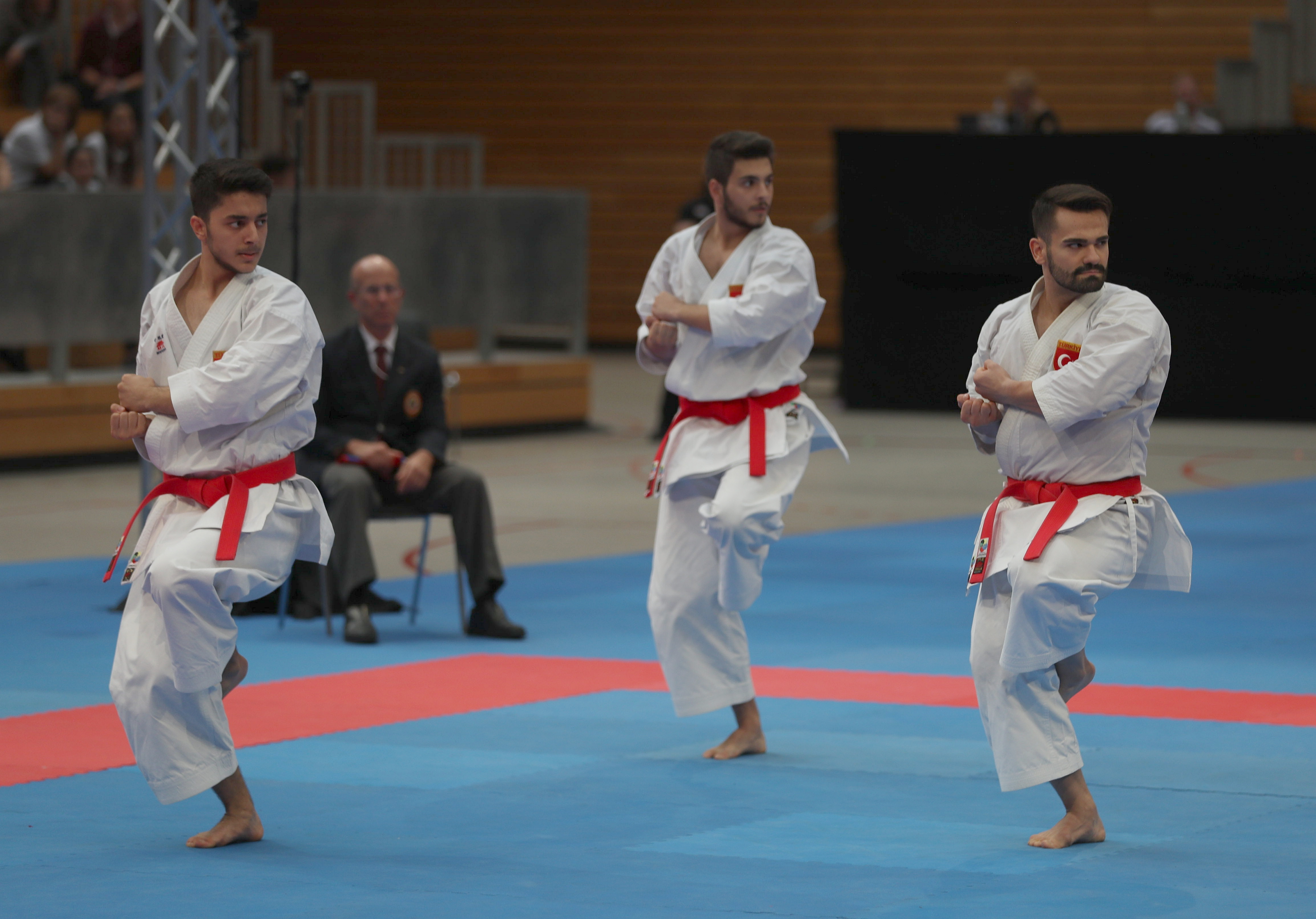 Male Team Kata am 16. September 2018 in der Karate1 Premier League Berlin 2018.